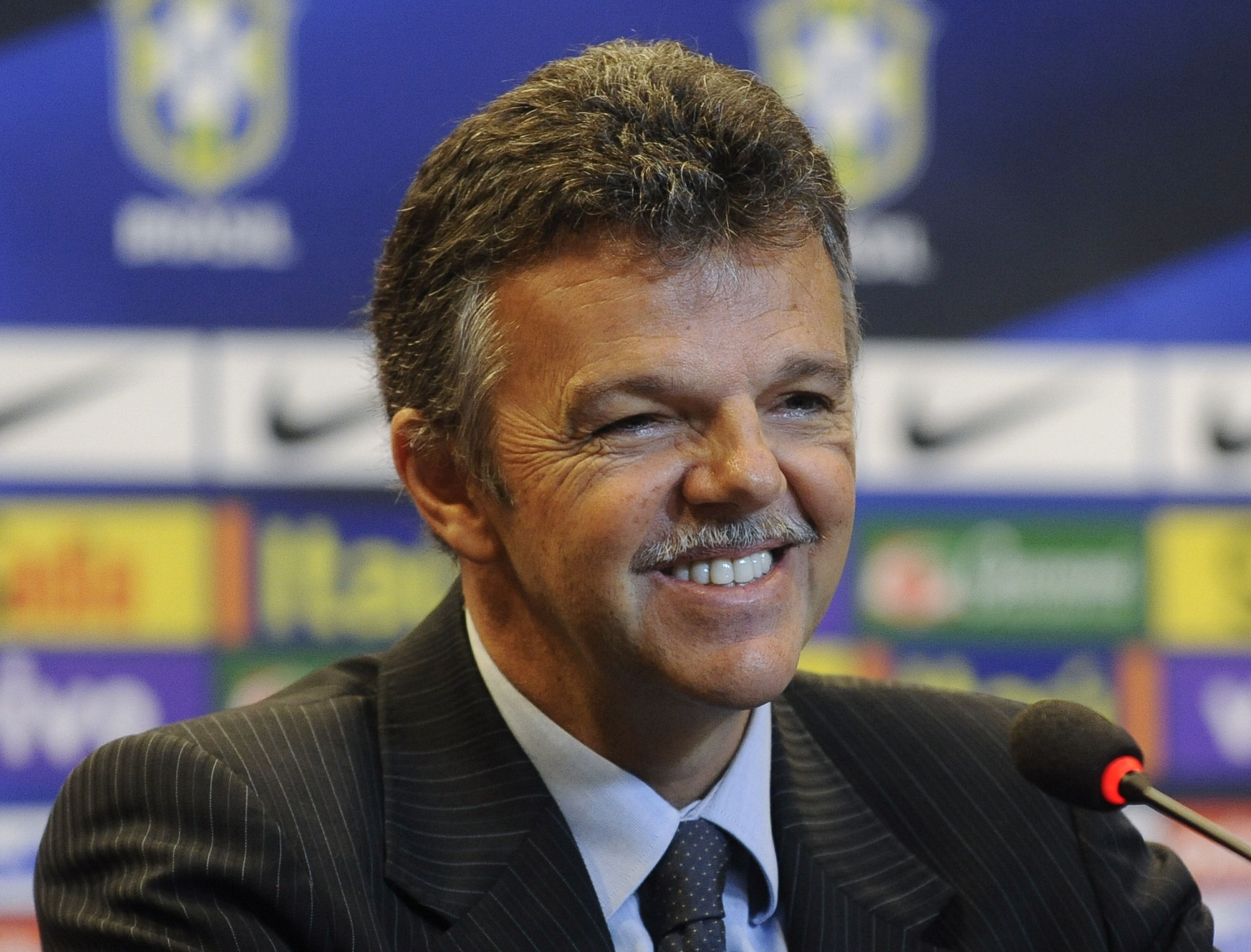 O ex-goleiro Gilmar Rinaldi na apresentação, pelo presidente da CBF, José Maria Marin, como o novo coordenador técnico da Seleção Brasileira.